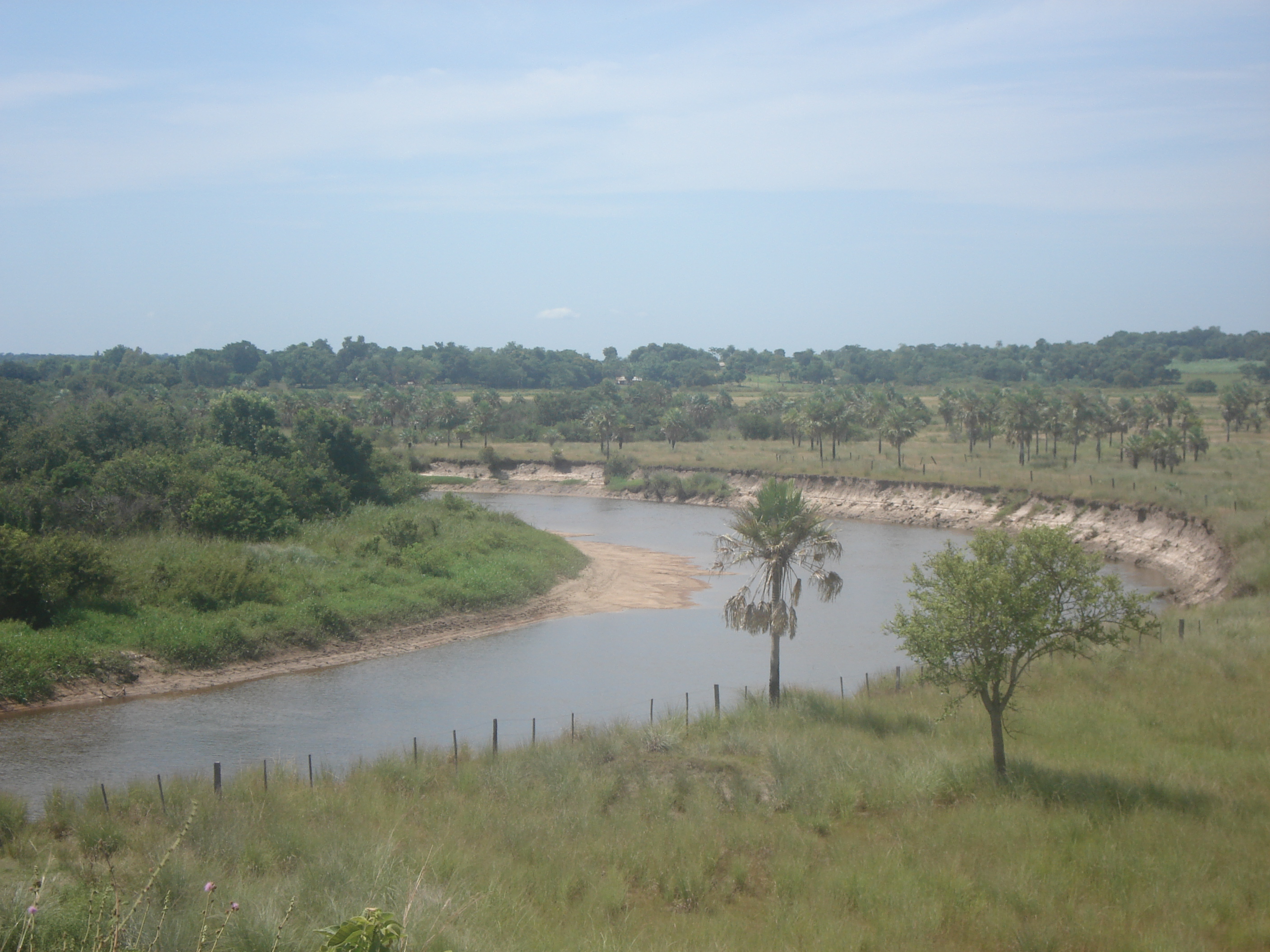 Rio yhaguy